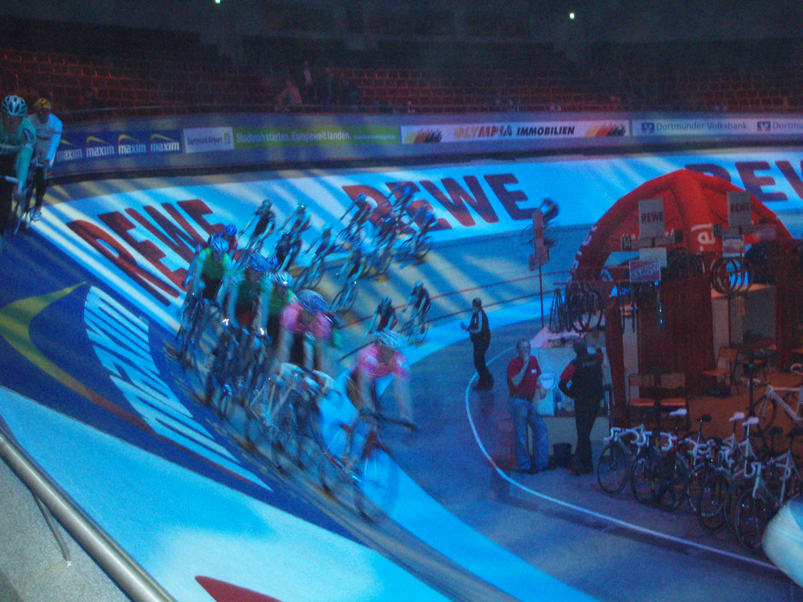 Mannschaftsrennen beim Sechstagerenne in Dortmund 2004